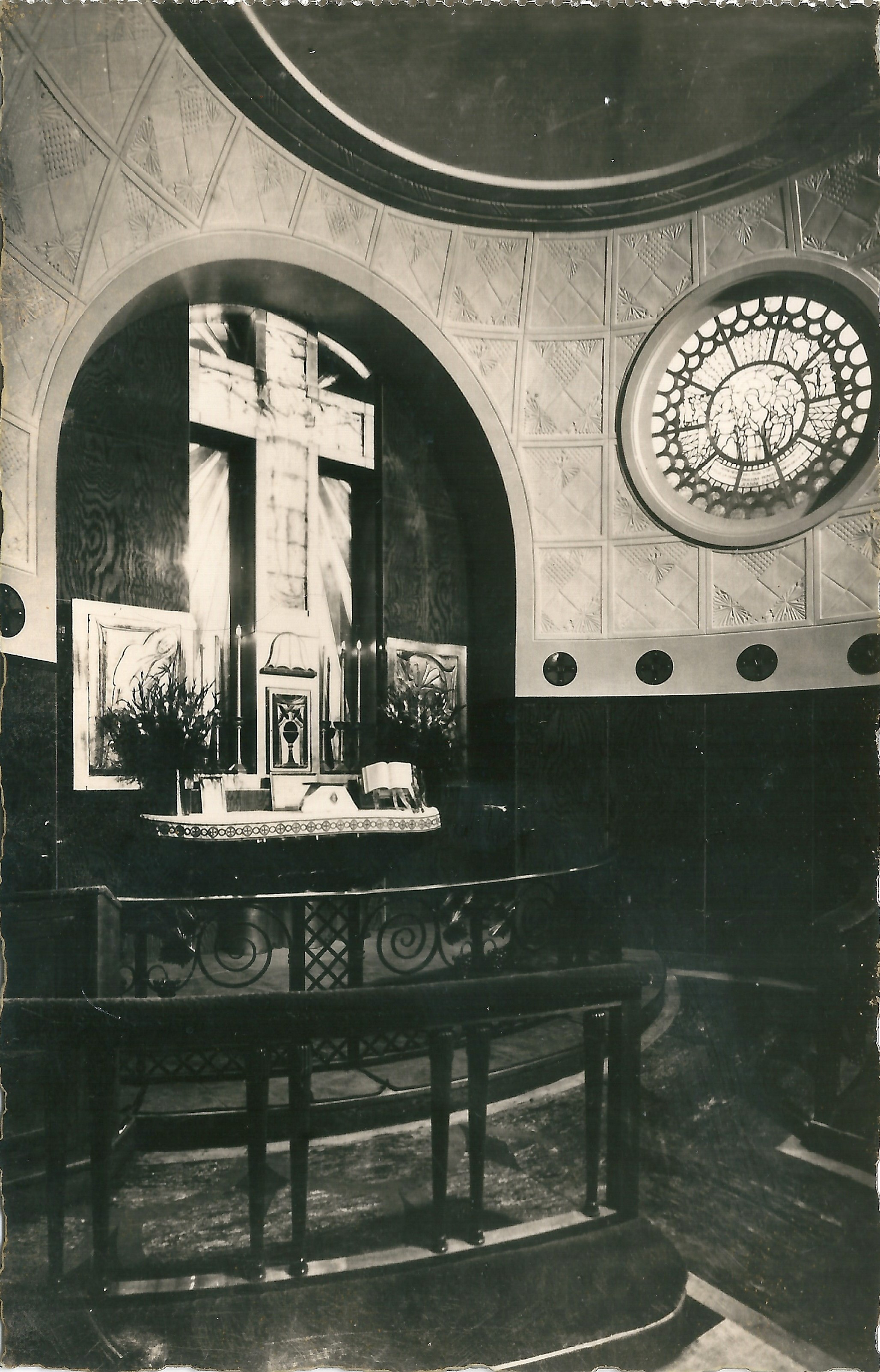 Le paquebot Ile de France" rénové